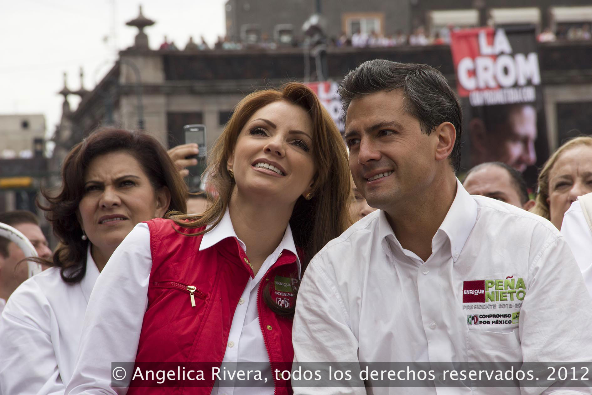 Cierre de Campaña de Enrique Peña Nieto, Toluca, Estado de México. Toluca, Estado de México. 27 de Junio de 2012. Cierre de Campaña de Enrique Peña Nieto, Toluca, Estado de México. Toluca, Estado de México. 27 de Junio de 2012.